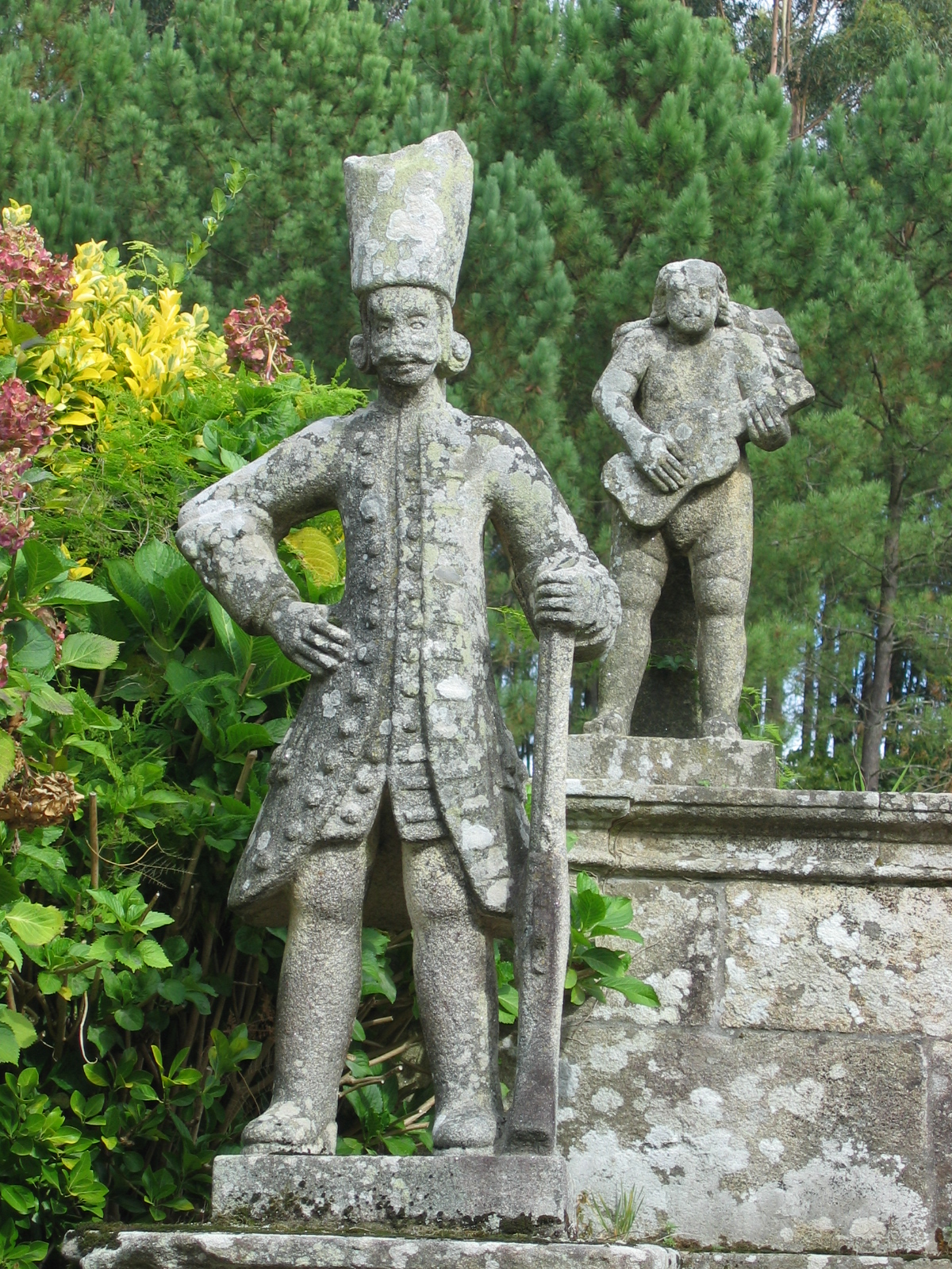 Detalle da fonte no cemiterio de San Pedro de Cea, Vilagarcía de Arousa (Pontevedra)